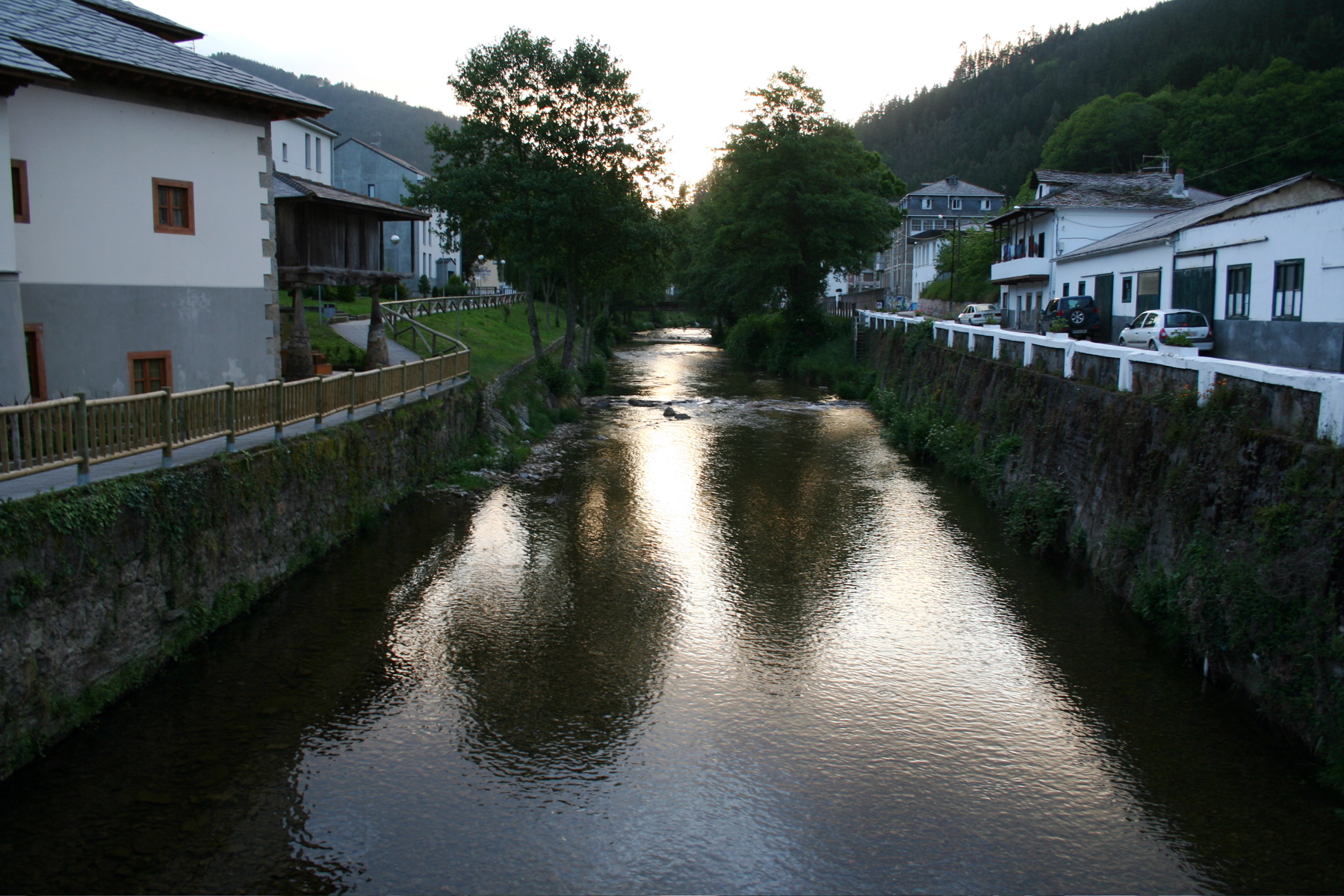 Navelgas